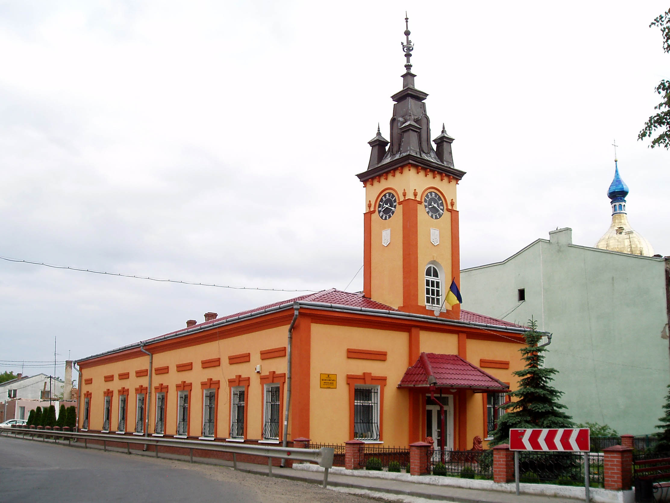 Ратуша у Болехові.